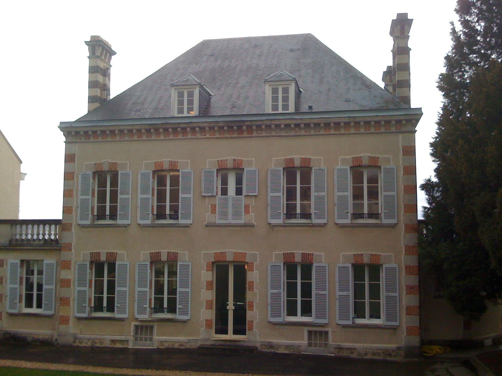 Maison du champagne Bollinger